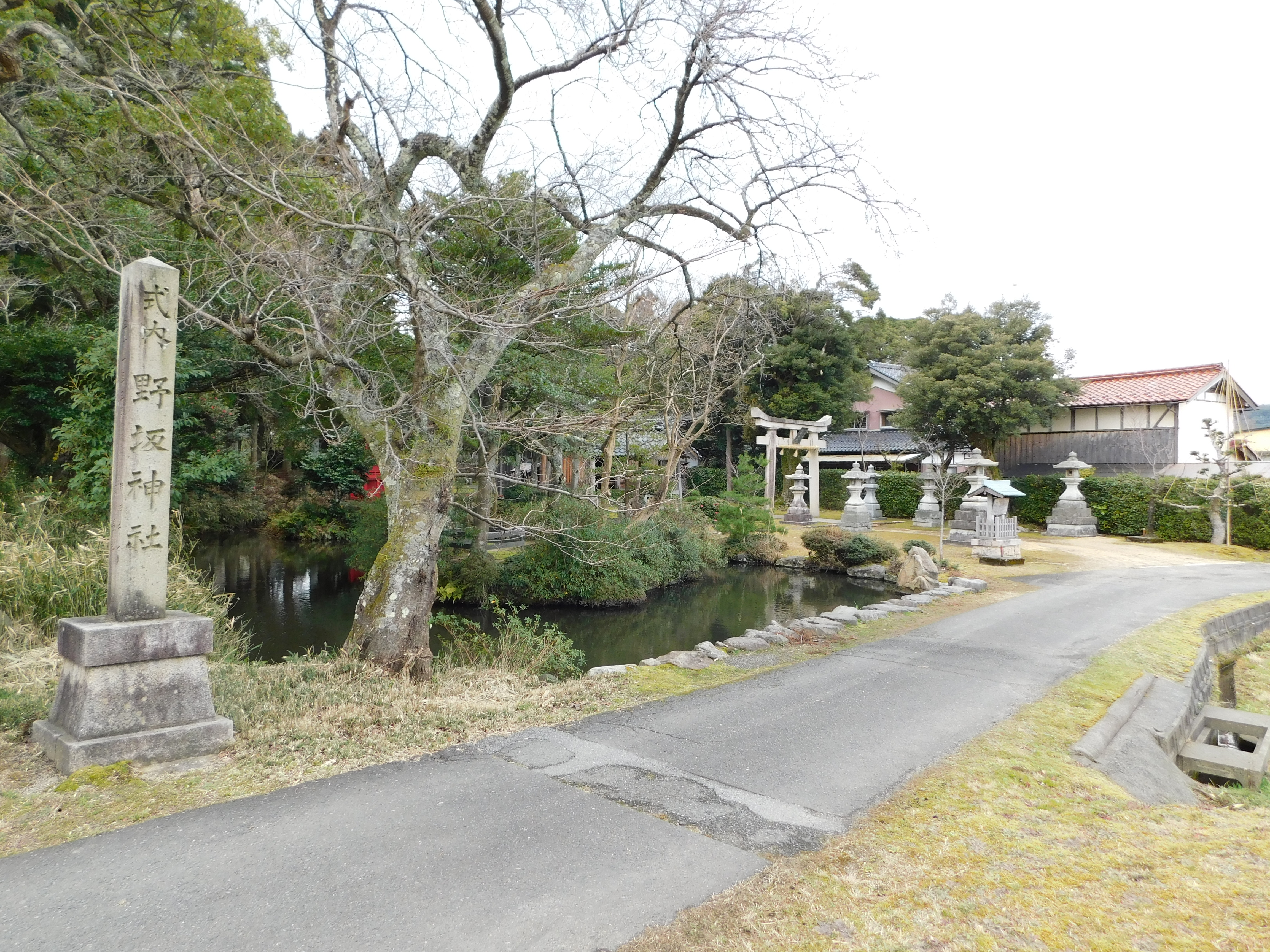 福井県敦賀市の式内野坂神社